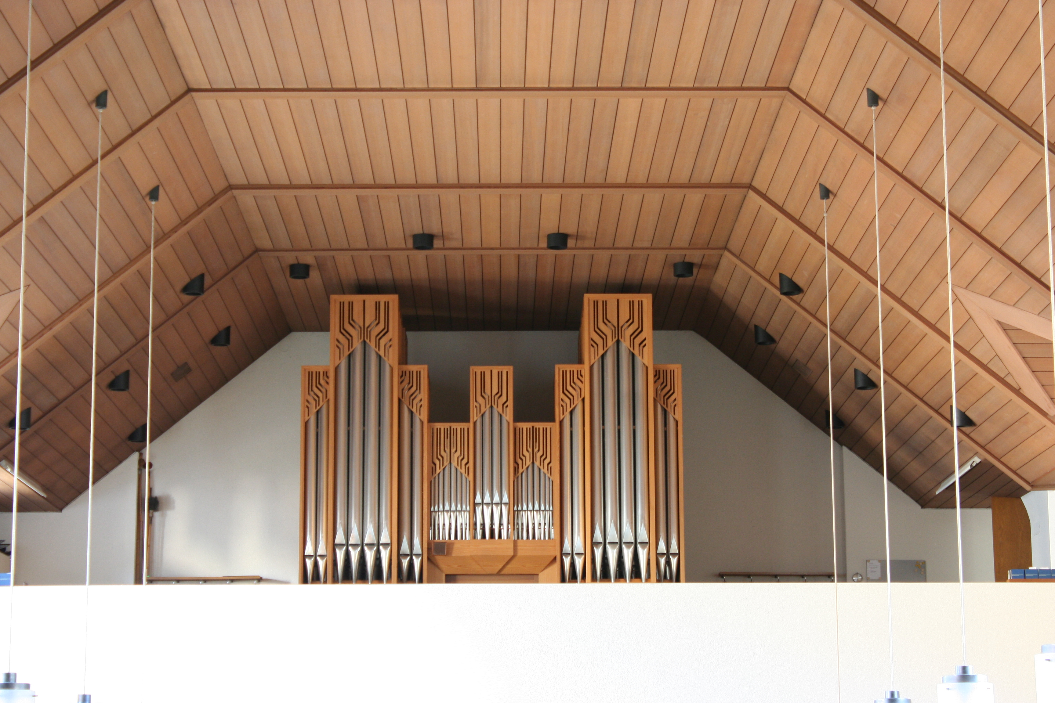 Römisch-katholische Pfarrkirche St. Marien Winterthur-Oberwinterthur, Orgel